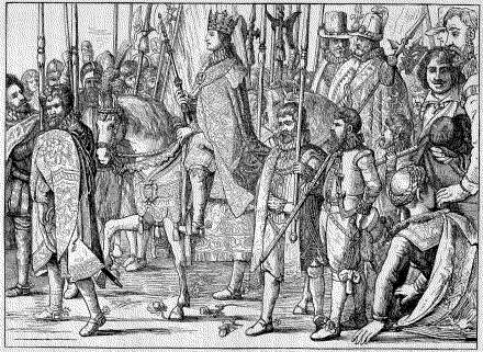 Kroningsfestlighetene i 1596. Christian den Fjerde i Kroningsprocessionen. Etter Karl v. Manderns tapet, tegnet av F. C. Lund. Orig. på Rosenborg.